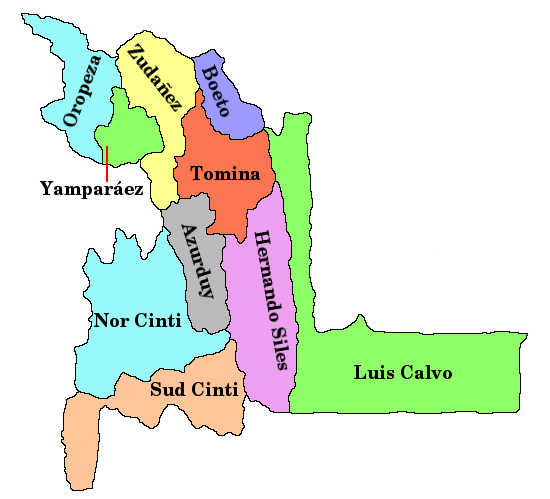 Carte du département de Chuquisaca en Bolivia